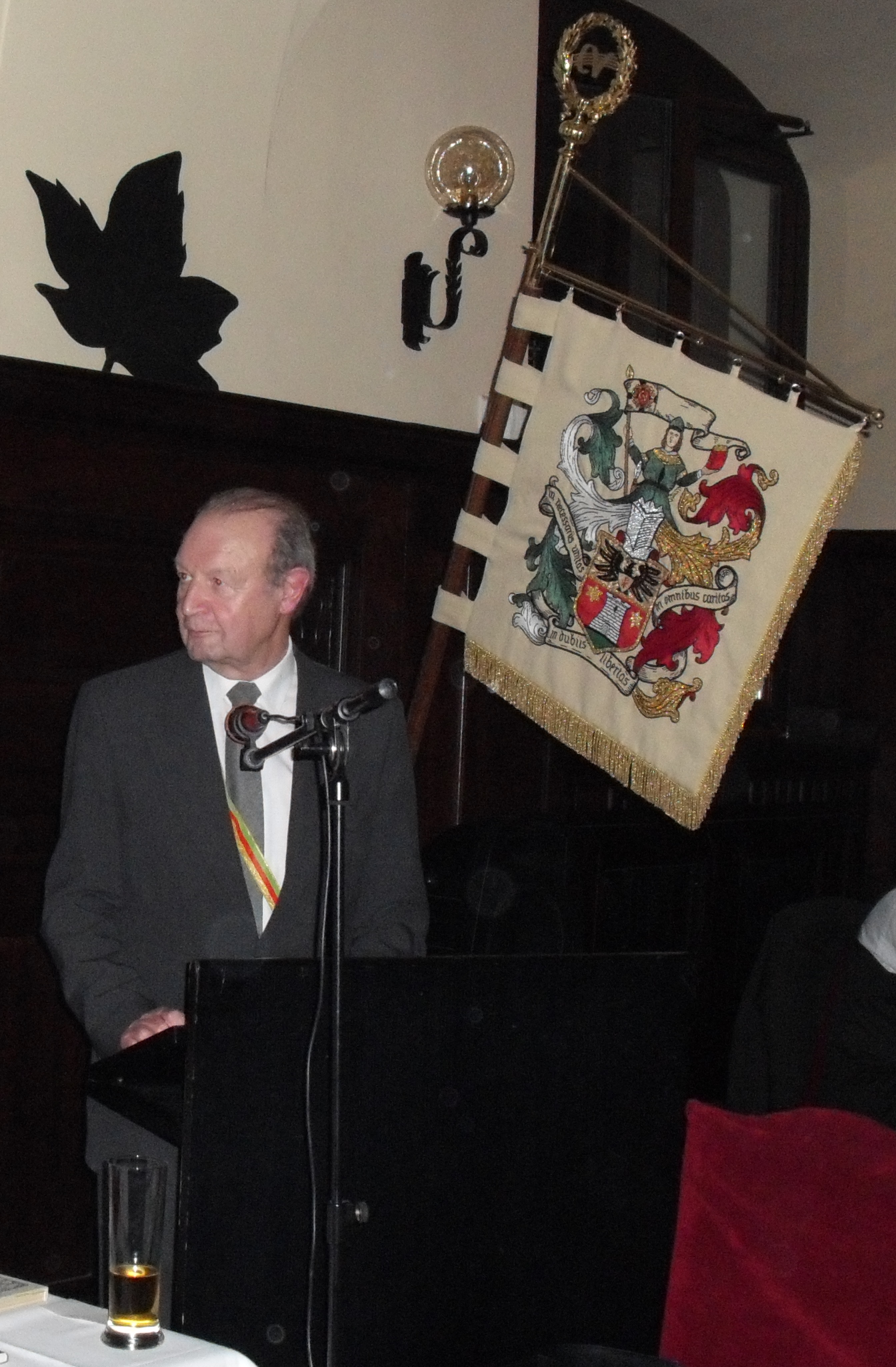 Franz Georg Friemel als Festredner beim Festkommers der katholischen Verbindungen der Rudelsburger Allianz zum 20, Jahrestag des Mauerfalls im Ratskeller zu Leipzig